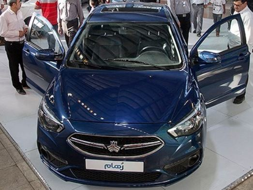 نمایشگاه خودرو - کرمانشاه